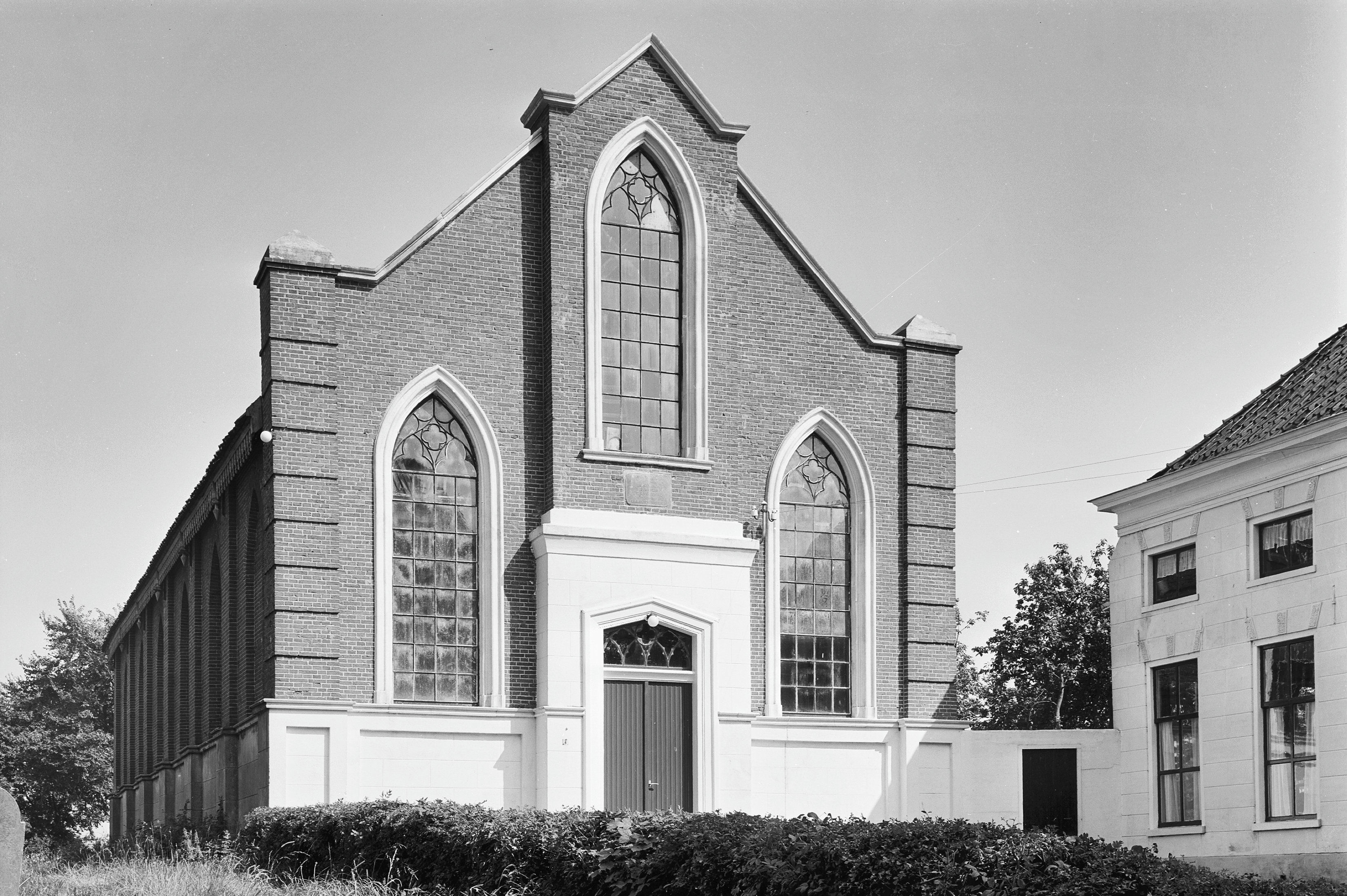 Nederlands Hervormde Kerk: west-zijde